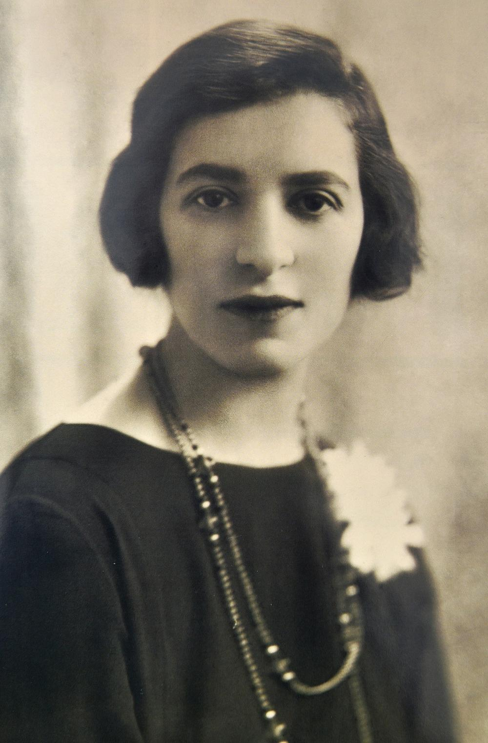 Marcelle Meyer de jove